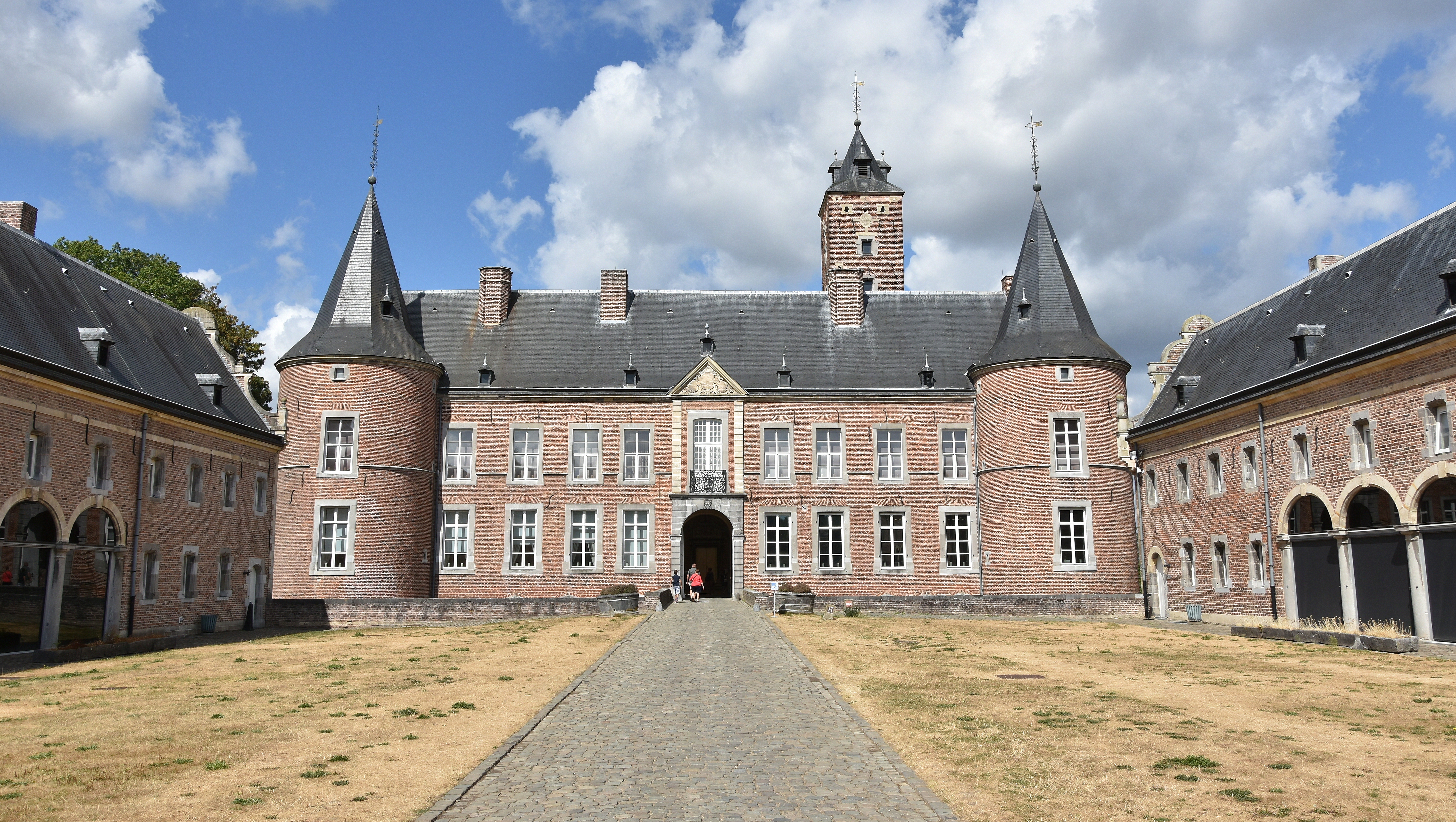 Waterkasteel en voorhof Alden Biesen 10-08-2018 This photo of immovable heritage has been taken in the Flemish Region